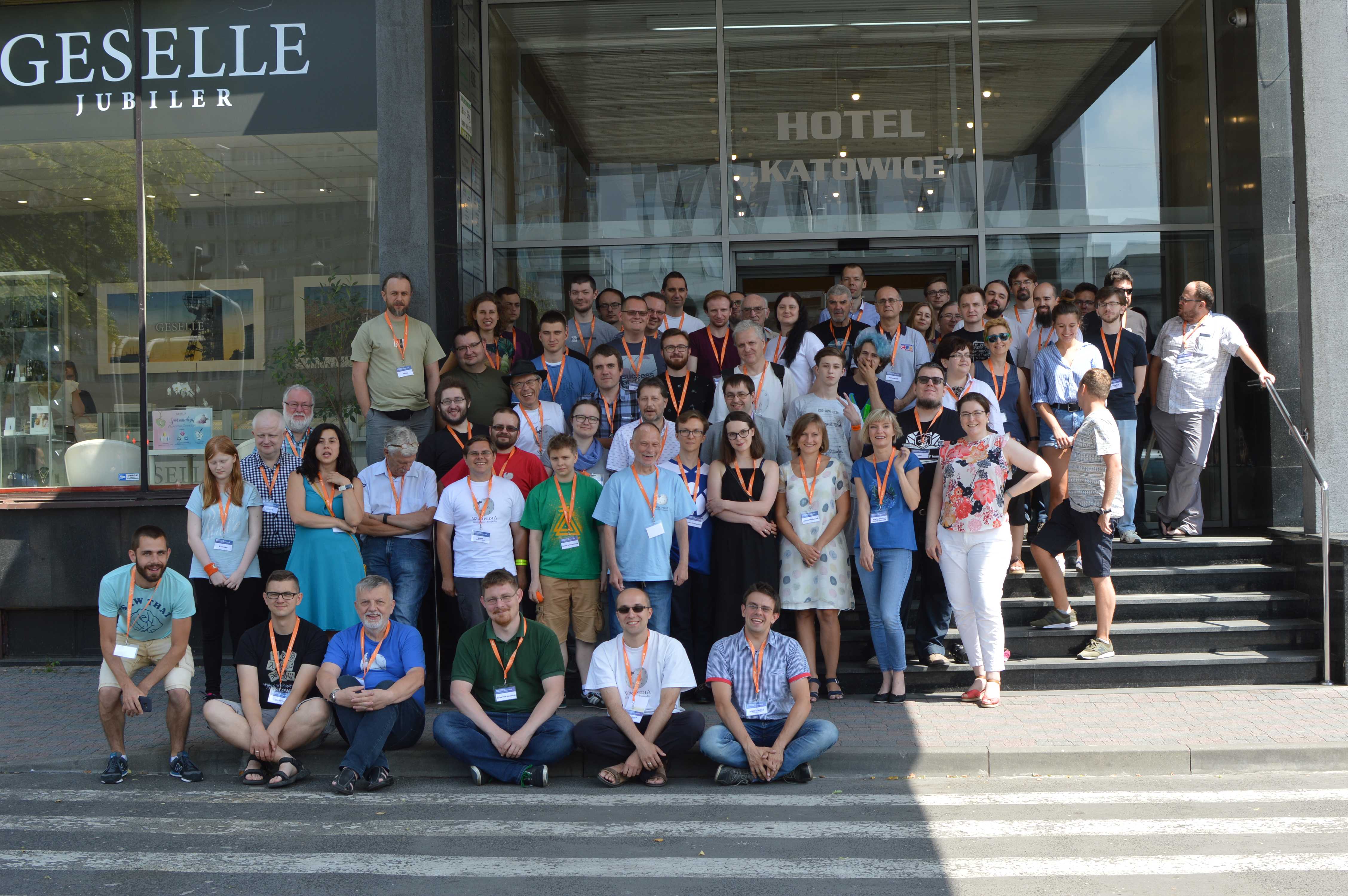 Konferencja Wikimedia Polska 2018 - zdjęcie grupowe